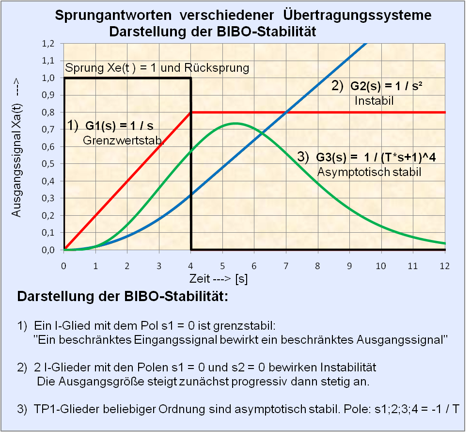 BIBO-Stabilität für verschiedene Übertragungssysteme